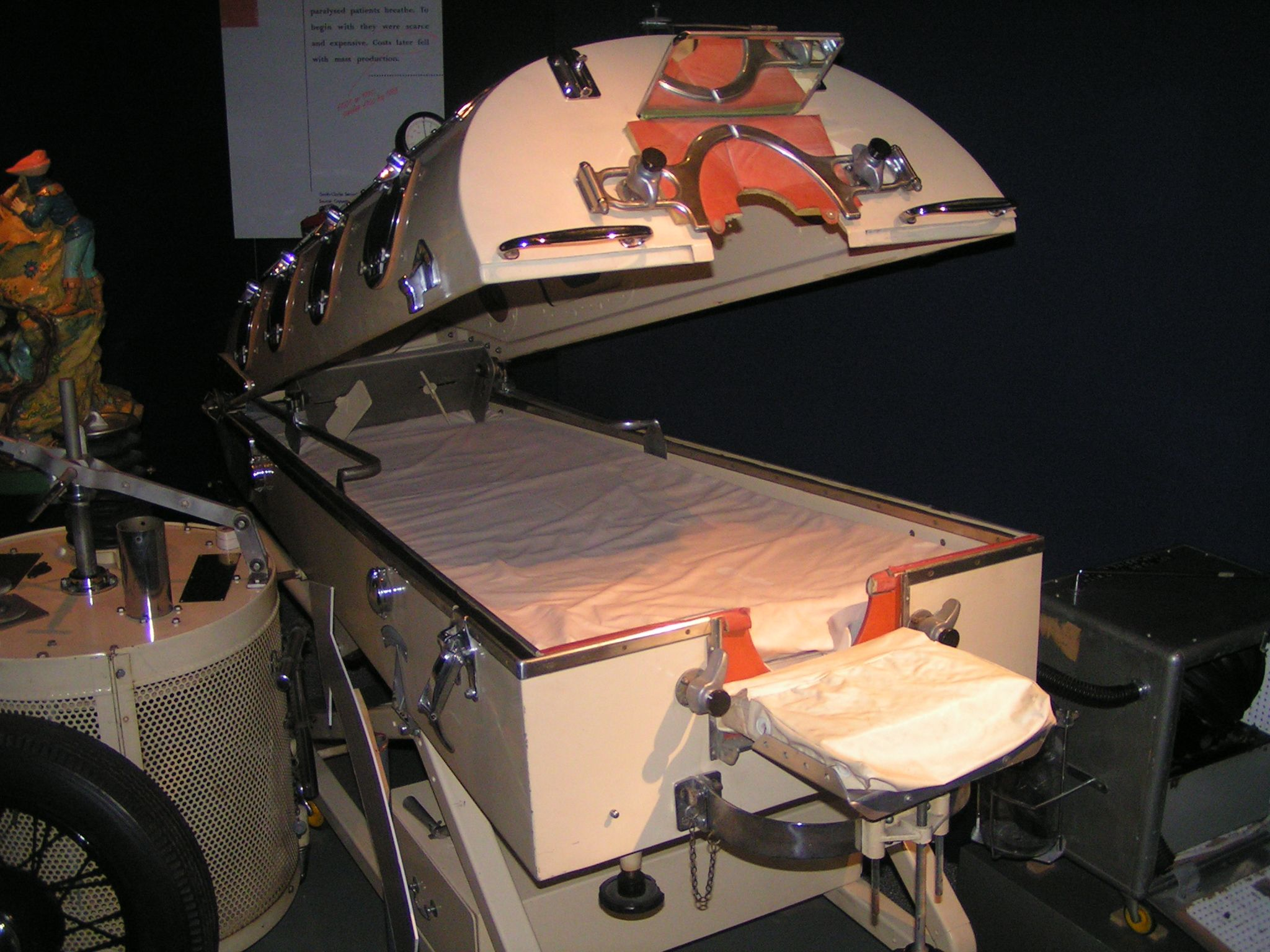 Eiserne Lunge (geöffnet) im Science Museum, London